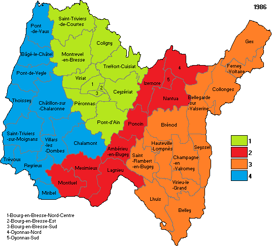 Circonscriptions de l'Ain en 1986